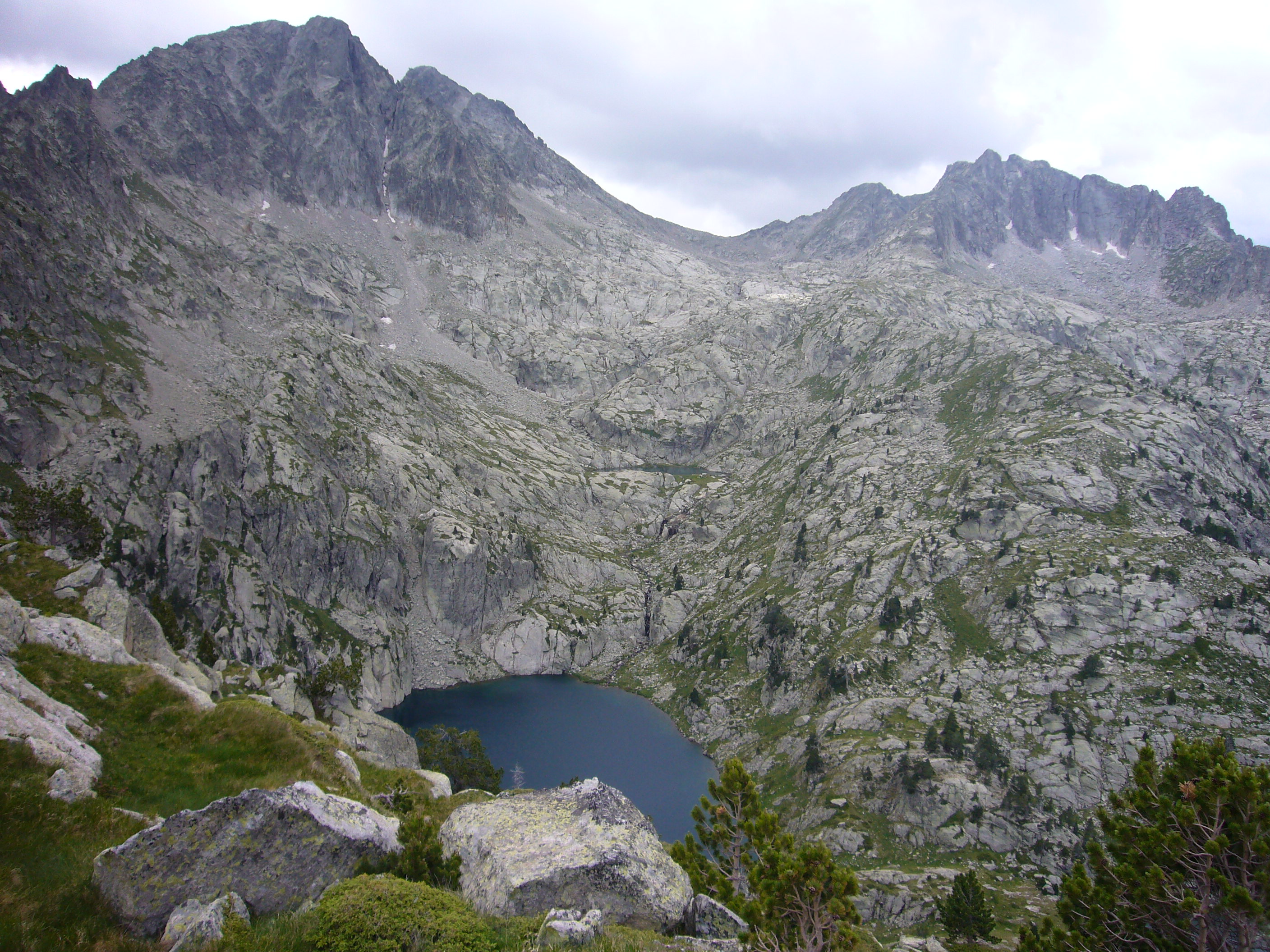 Estany Nere i Coma dels Pescadors, vistos des dels peus de l'Agulla del Portarró; Espot, Pallars Sobirà, Catalunya